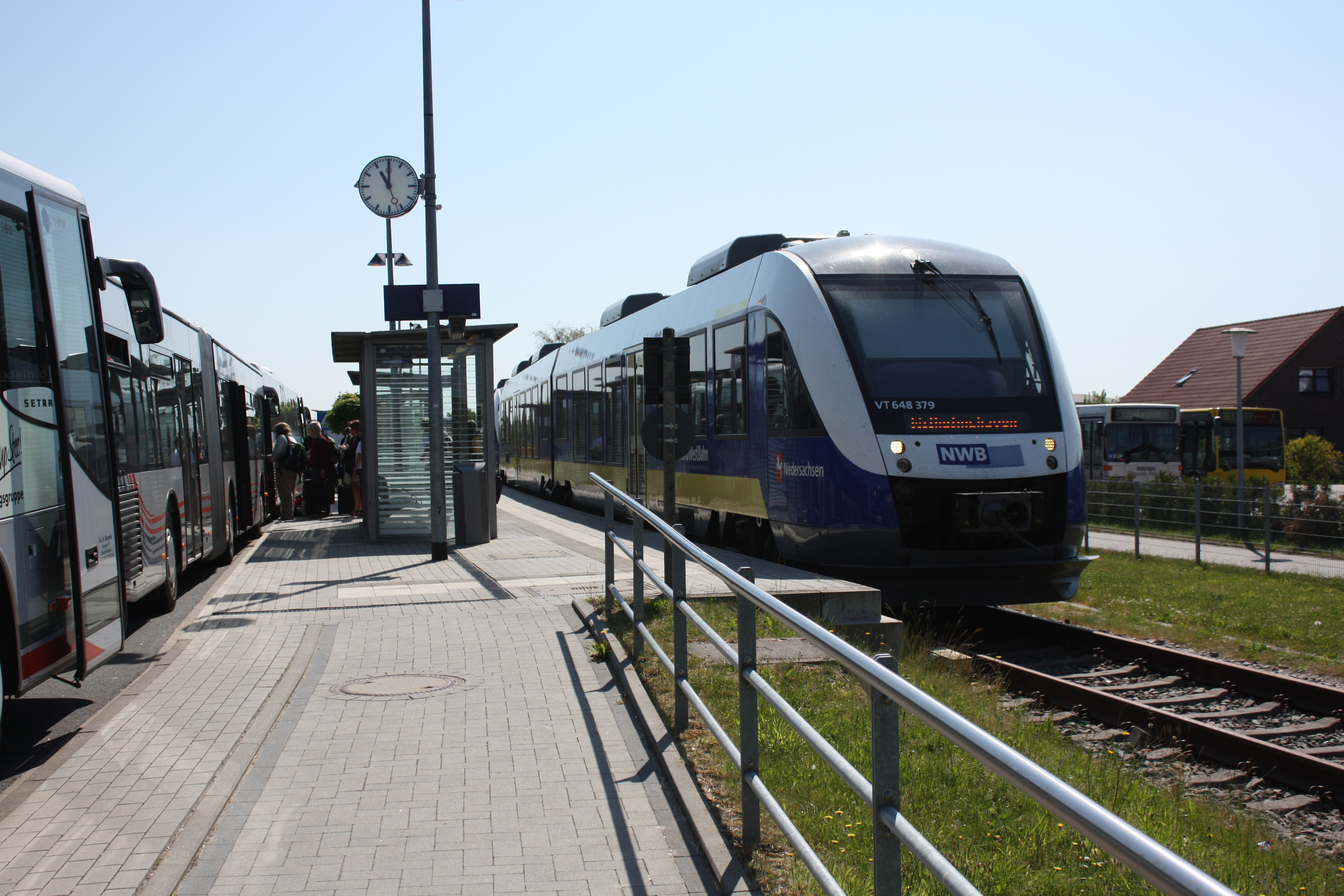 Bahnhof Esens (Ostfriesl)